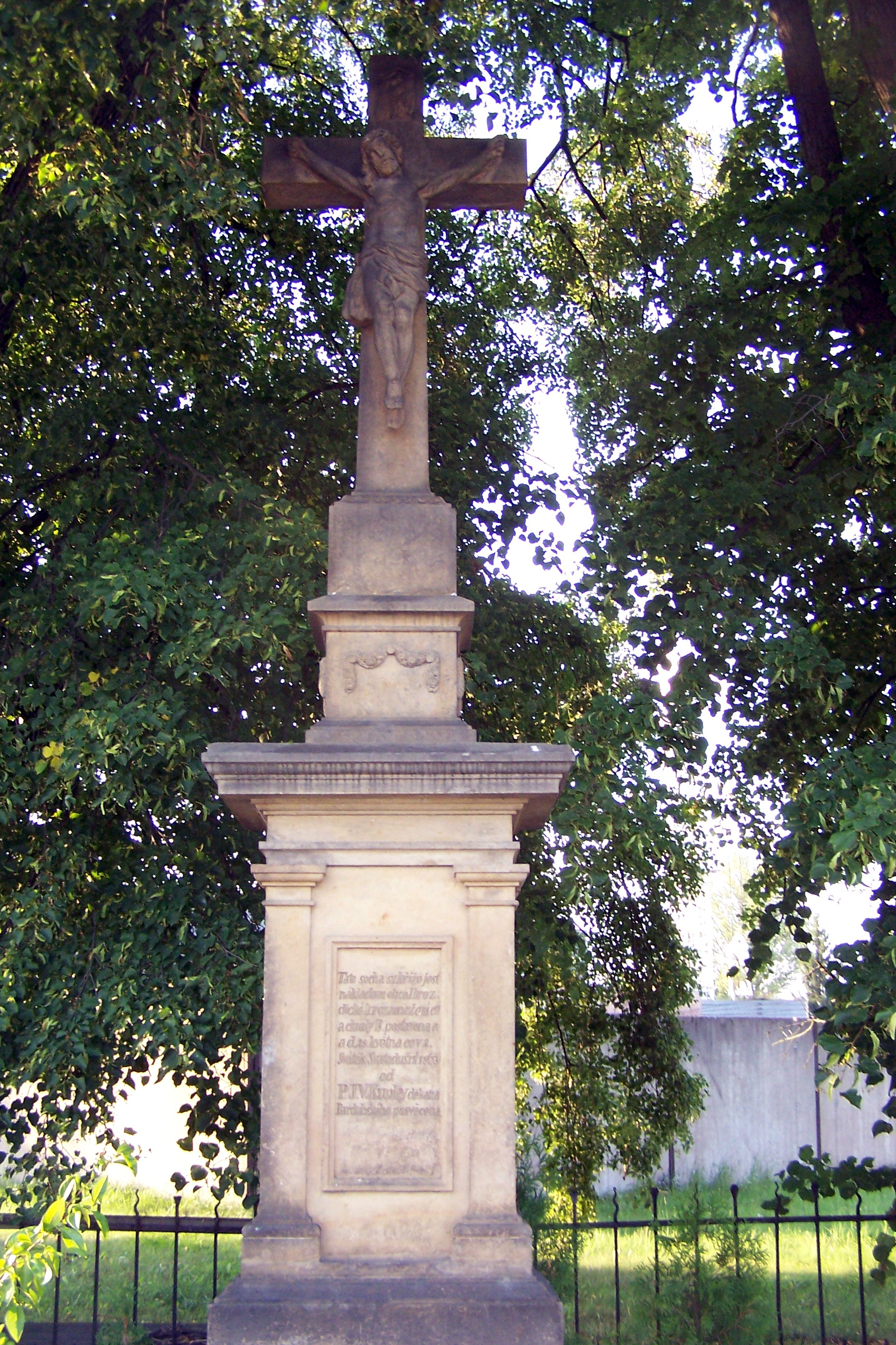 Drozdice, křížek. GPS: 50°1'4.041"N, 15°49'4.238"E